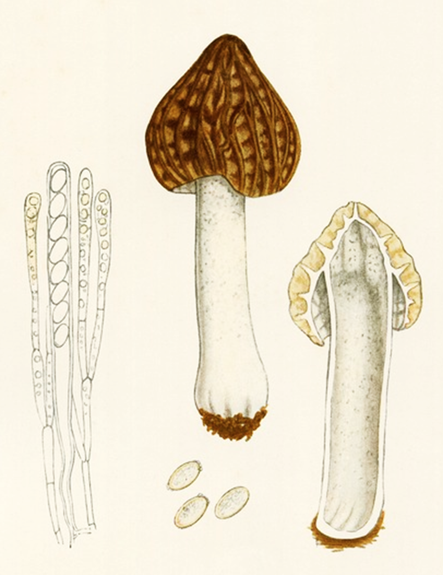 Giacomo Bresadola: Morchella crassipes